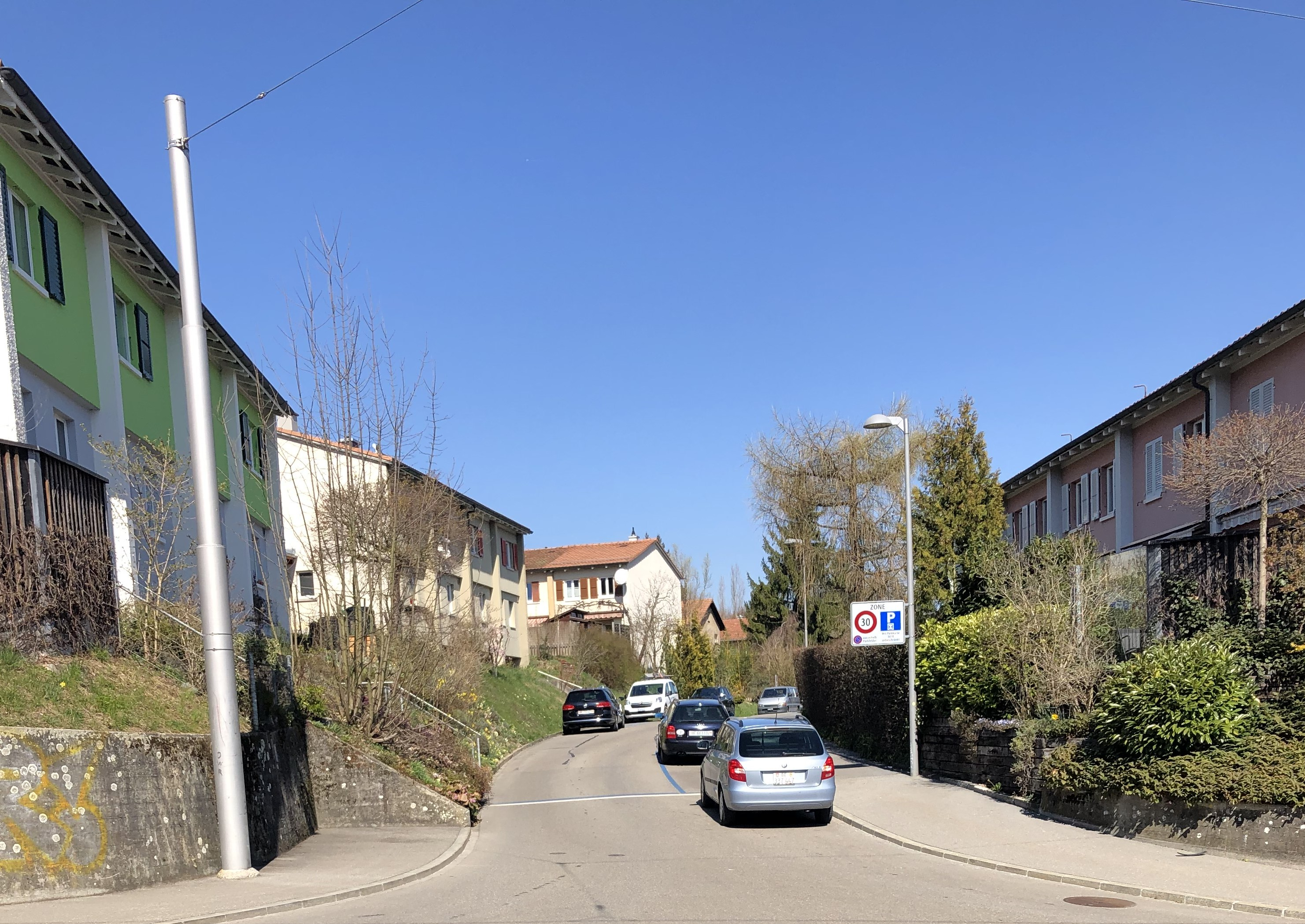 Winterhale Bebaung Siedlung